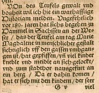 • Wunderzeichen mit Figuren: Wahrhafftige beschreibung vnd gründliche verzeichnis, schrecklicher Wunderzeichen vñd Geschichten, die von dem Jar an 1517. bis auff jtziges Jar 1556 geschehen vñ ergangen sind